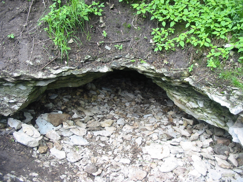 Virulase koopa ava